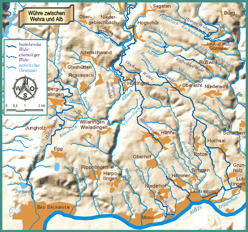 Karte der ehemaligen und noch bestehenden Wuhre zwischen den Flüssen Wehra und Alb im Südschwarzwald.